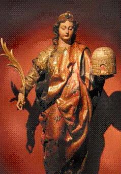 Talla de Santa Eulalia, catedral de Mérida